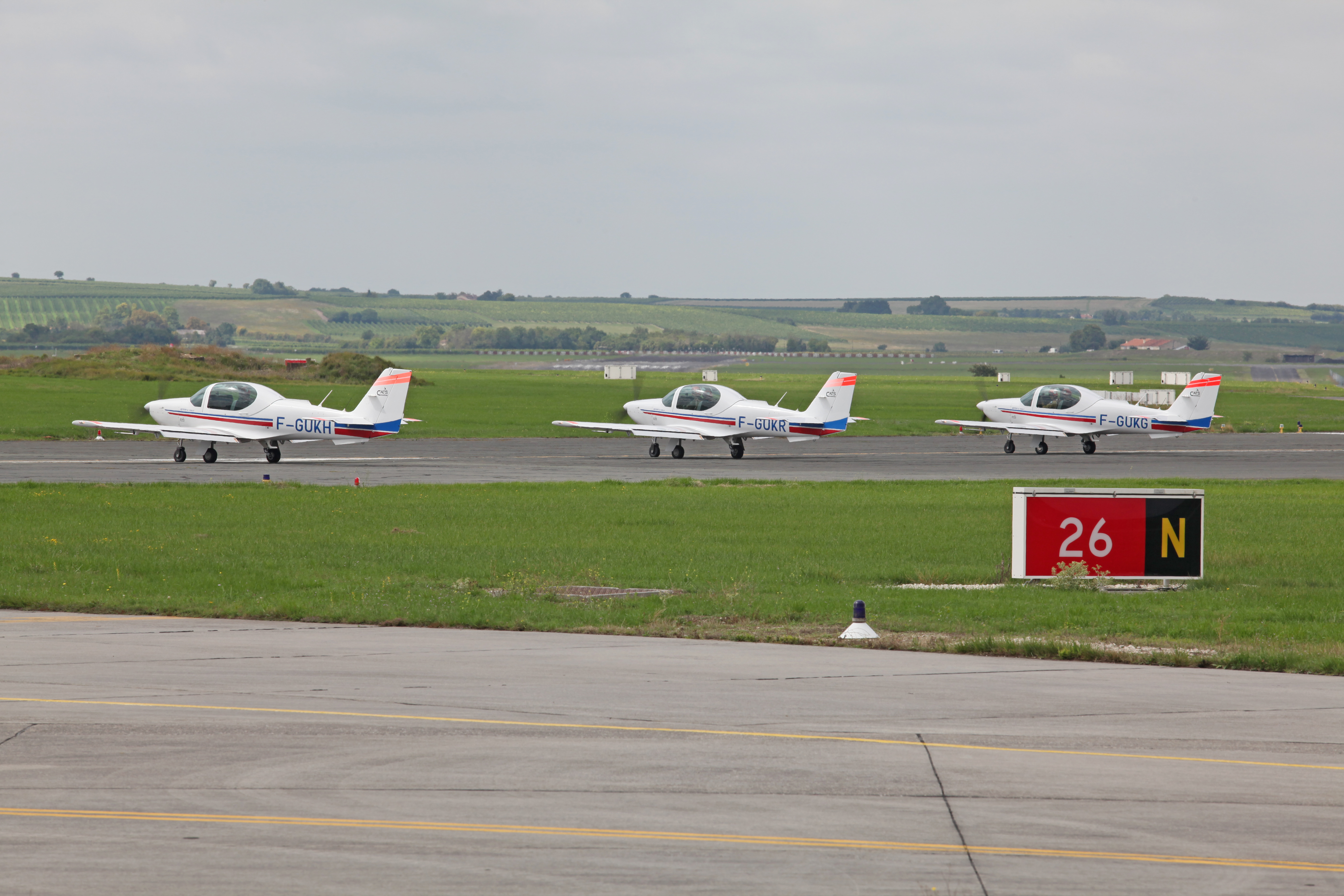 Grob G 120 A sur la base aérienne 709 Cognac-Châteaubernard? A confirmer.